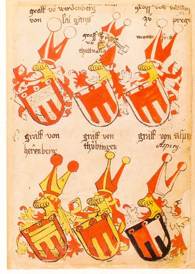 Ingeram-Codex der ehemaligen Bibliothek Cotta graff vo(n) werdenberg/von Salgans graff vo(n) thettnang graff von monttf . . ./zu Prege(ns) [Montt/fortt] gräff von/her(r)enberg gräff von thübingen gräff von asper/[Asperg]